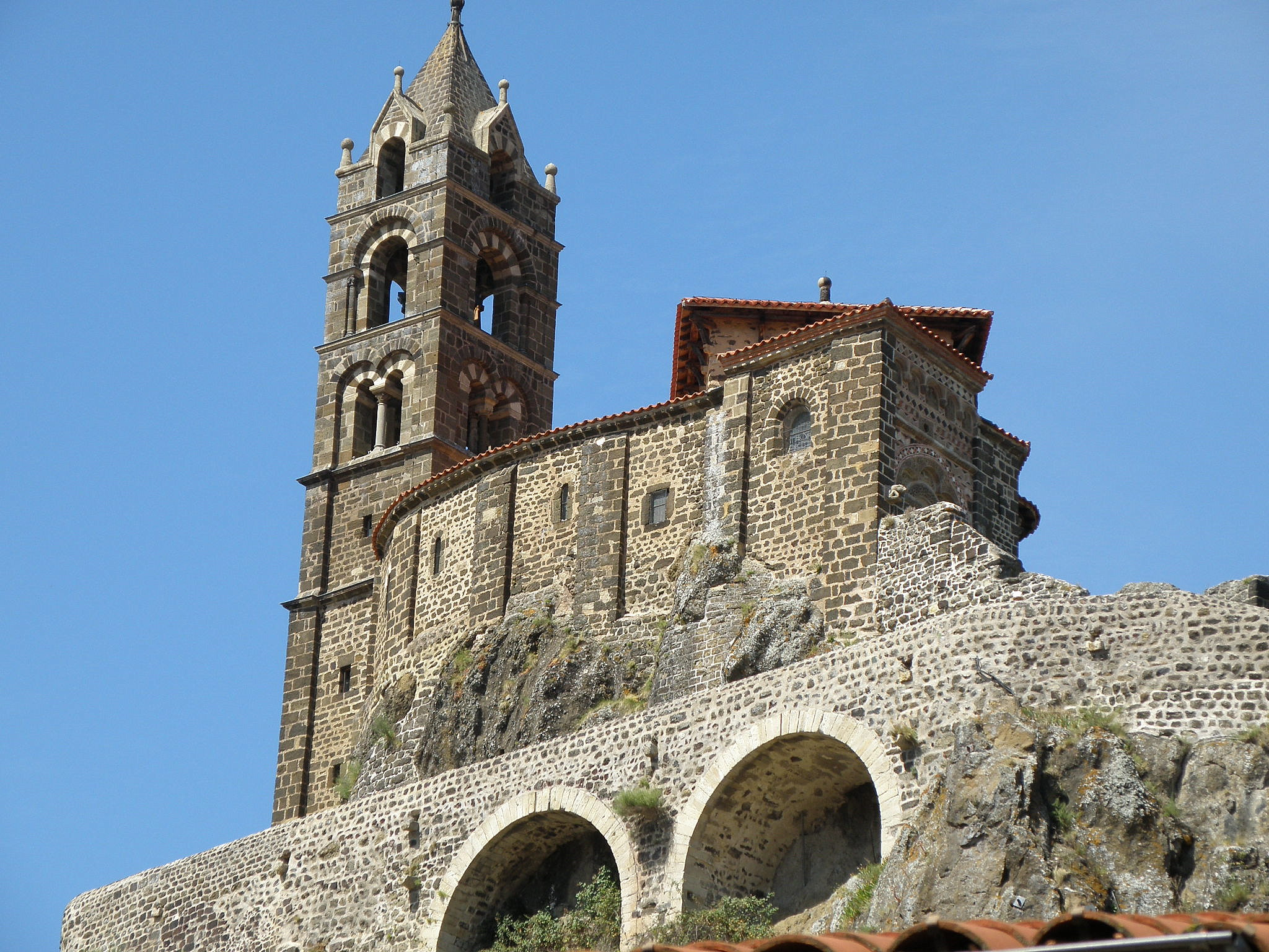 Aiguilhe, près du Puy-en-Velay. Église Saint-Michel, flanc méridional.